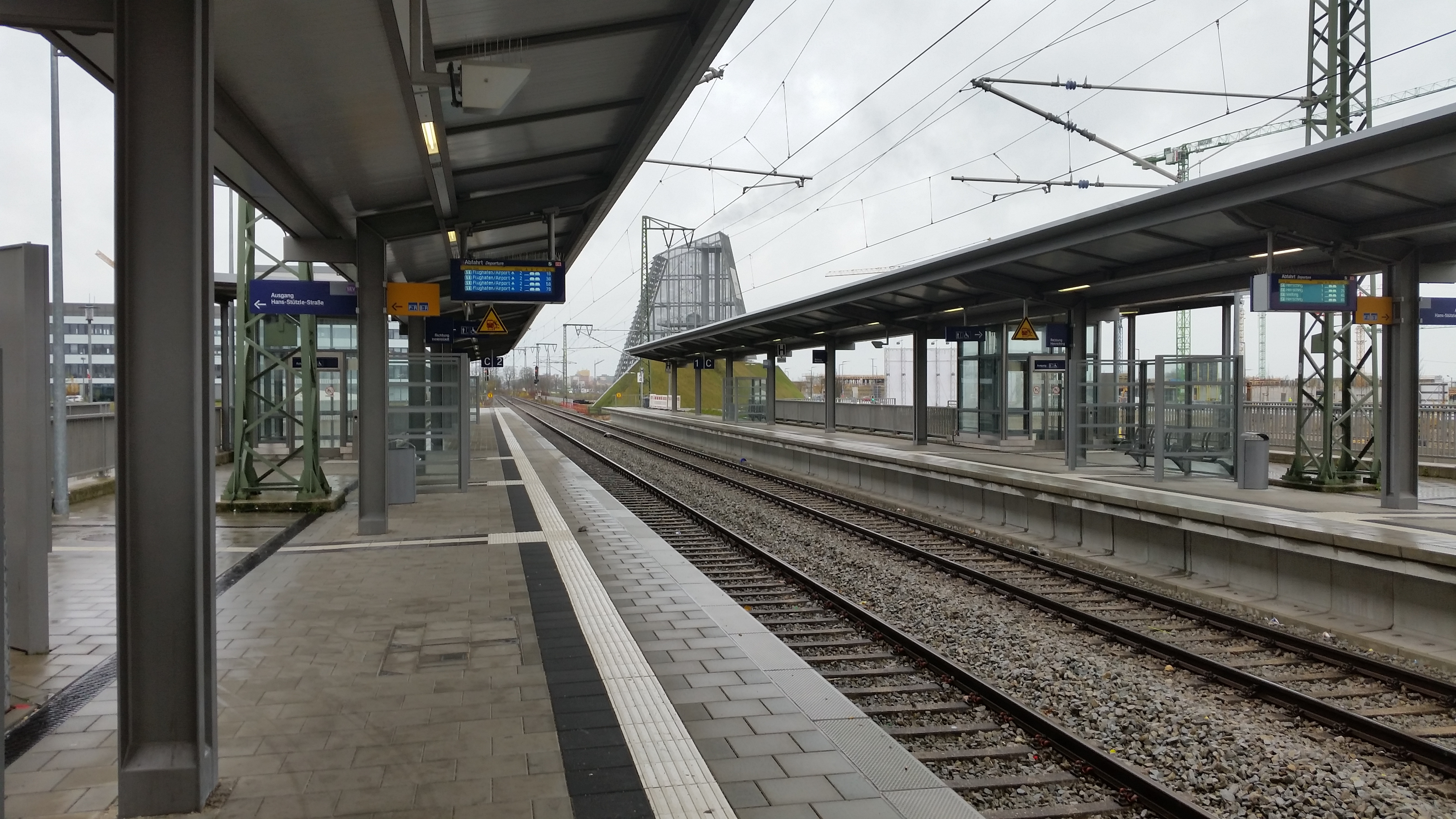 Bahnhof Freiham